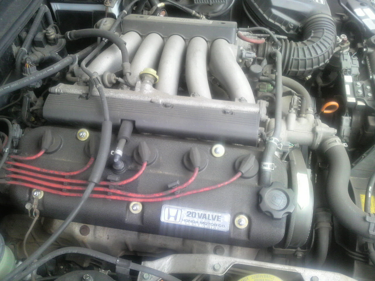 HONDA G20A Engine Left View